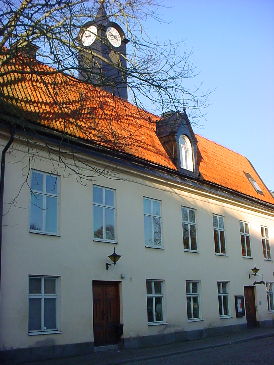 Enköping, Rådhuset.